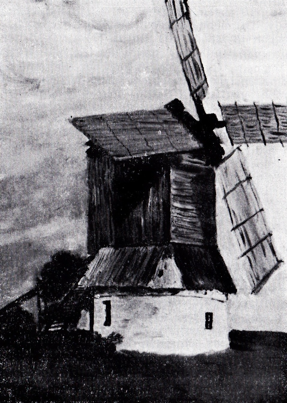 Représentation du moulin Dare-Dare de Pesselières (1908), avant sa destruction en 1908 également.